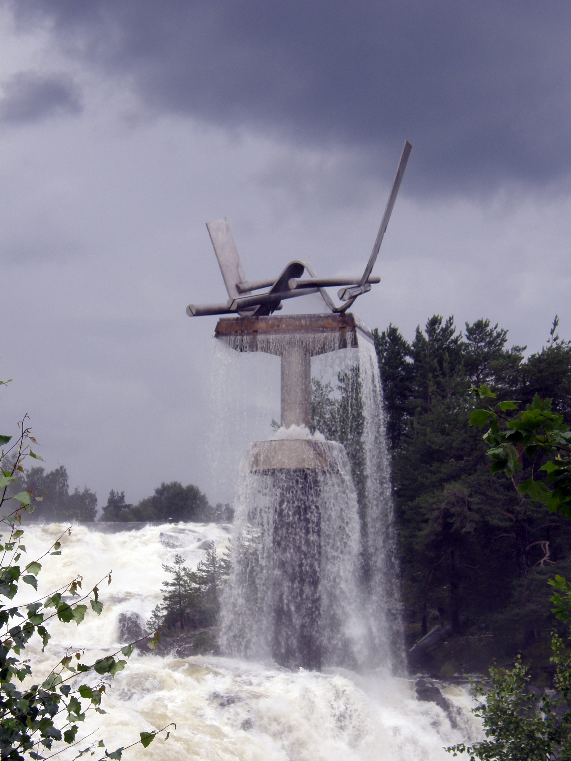 «Oppgangssaga» av Knut Steen (gitt i gave til byen av Hønefoss Sparebank i forbindelse med bankens 100-års jubileum i 1976)